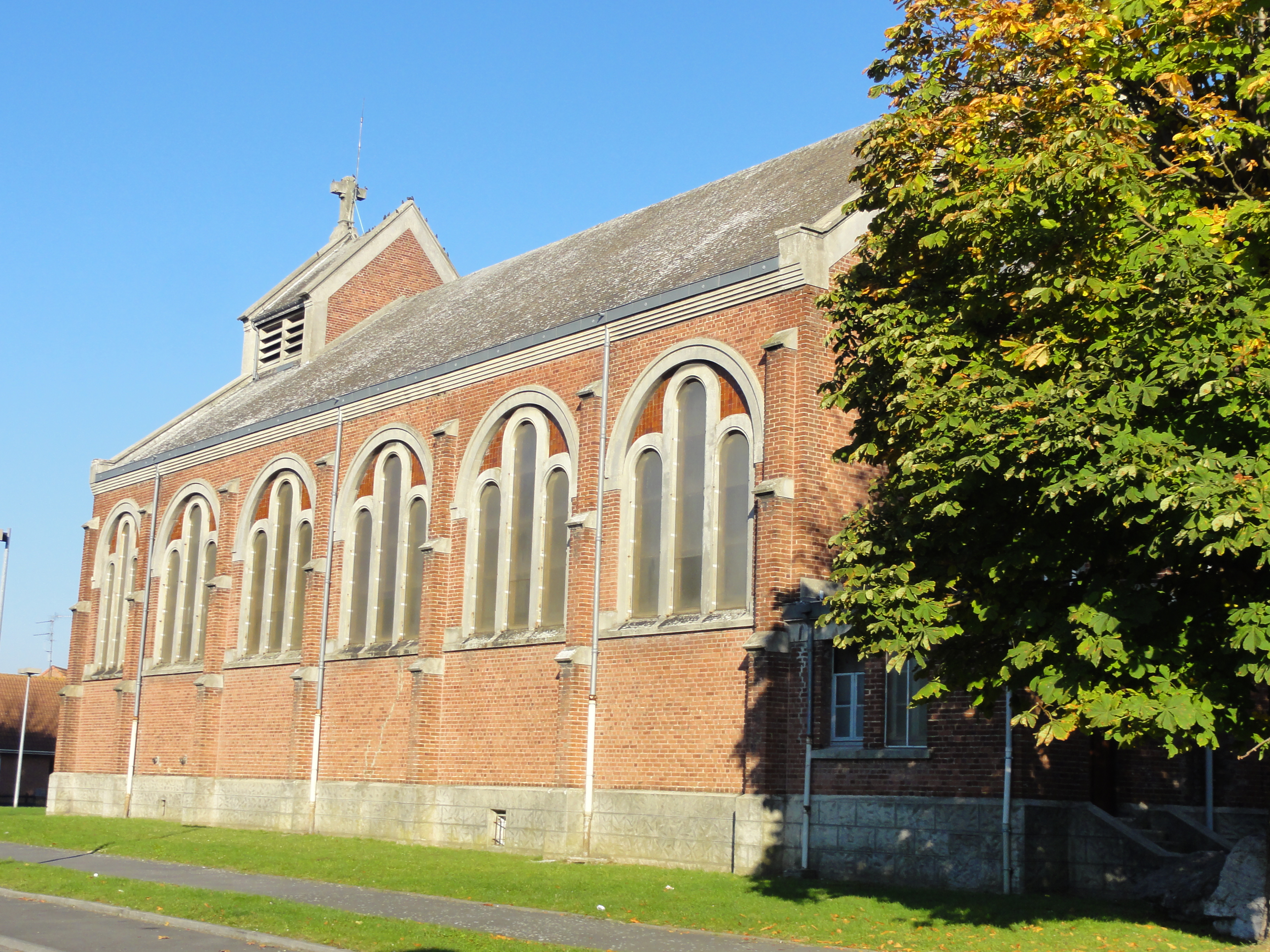 Église Saint-Jacques des cités de la Fosse n° 6 de la Compagnie des mines d'Ostricourt, Ostricourt, Nord, Nord-Pas-de-Calais, France.